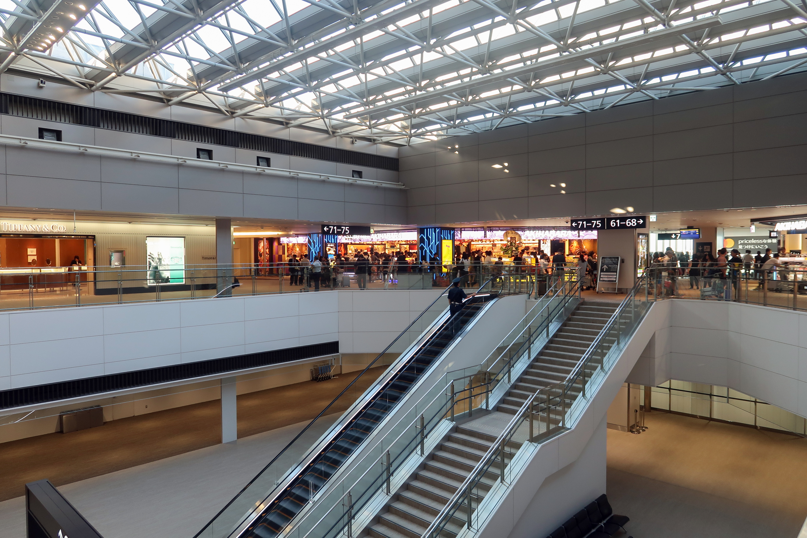 Narita Airport Terminal 2